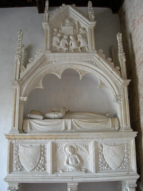 Cappella Ammannati nel Camposanto monumentale in Pisa. Sepolcro di Ligo Ammannati, docente di medicina nell'Università di Pisa (1359)